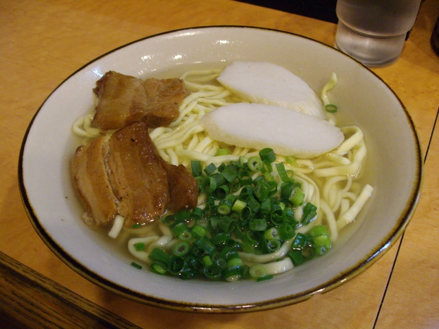 2008年撮影